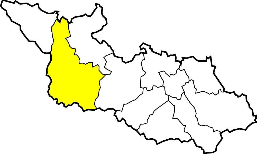 Diecezja ostrawsko-opawska - dekanat Bruntal